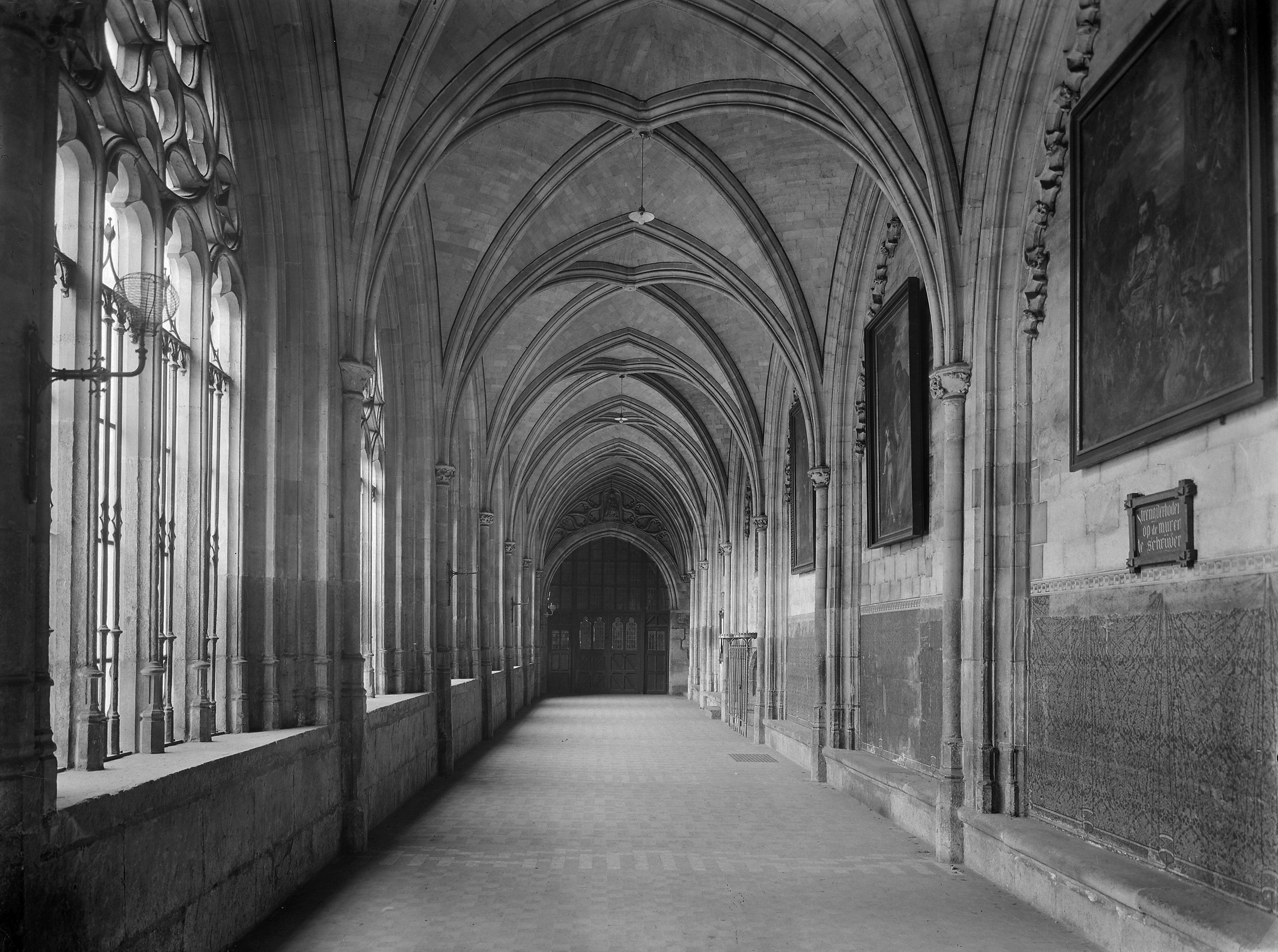 Sint-Servaaskerk: oostelijke kloostergang